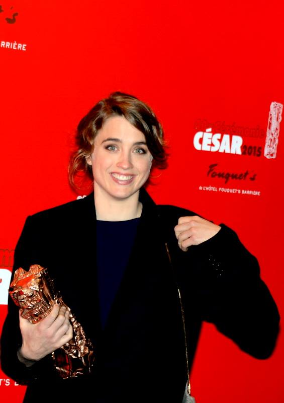 Adèle Haenel à la cérémonie des César